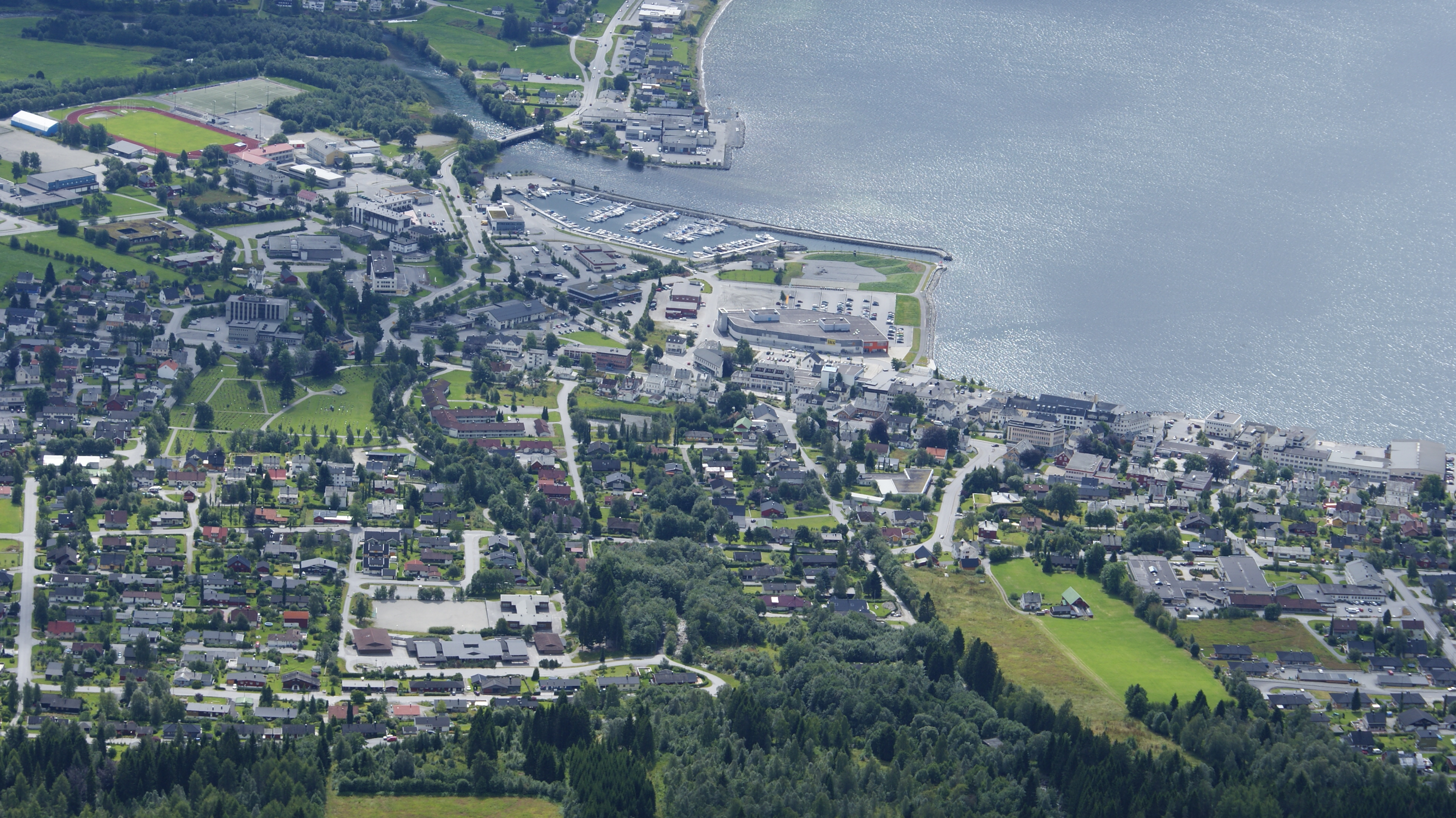 Ørsta, Sunnmøre, Møre og Romsdal, Norway. Photographed from Vallahornet.